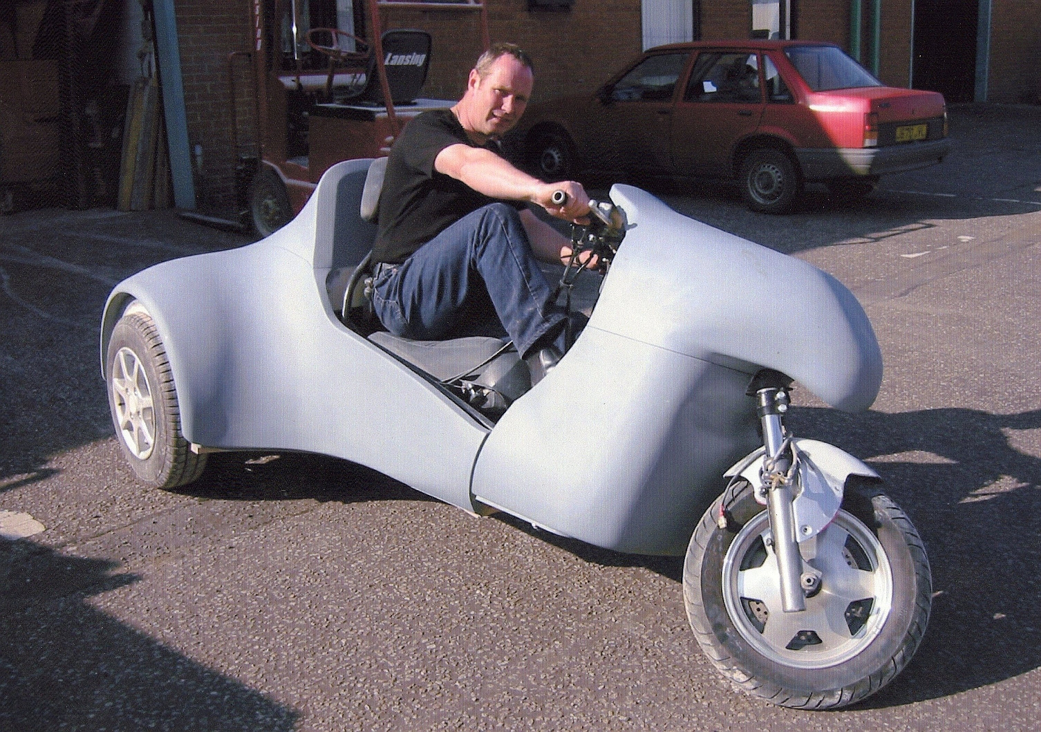 Stuart Mills demonstrating tilting trike prototype